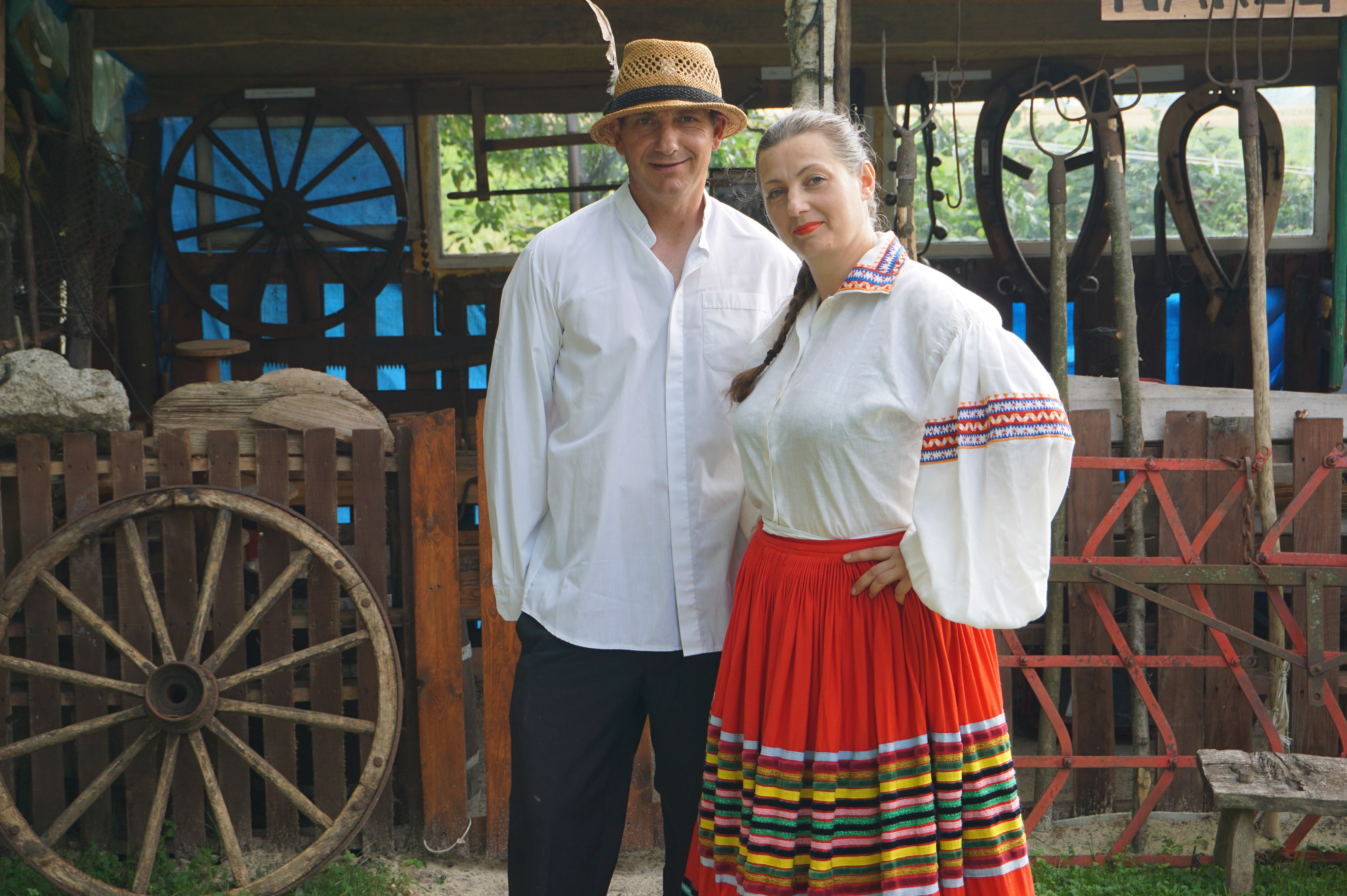 Sołtys Daniel Pawłowski wraz z żoną